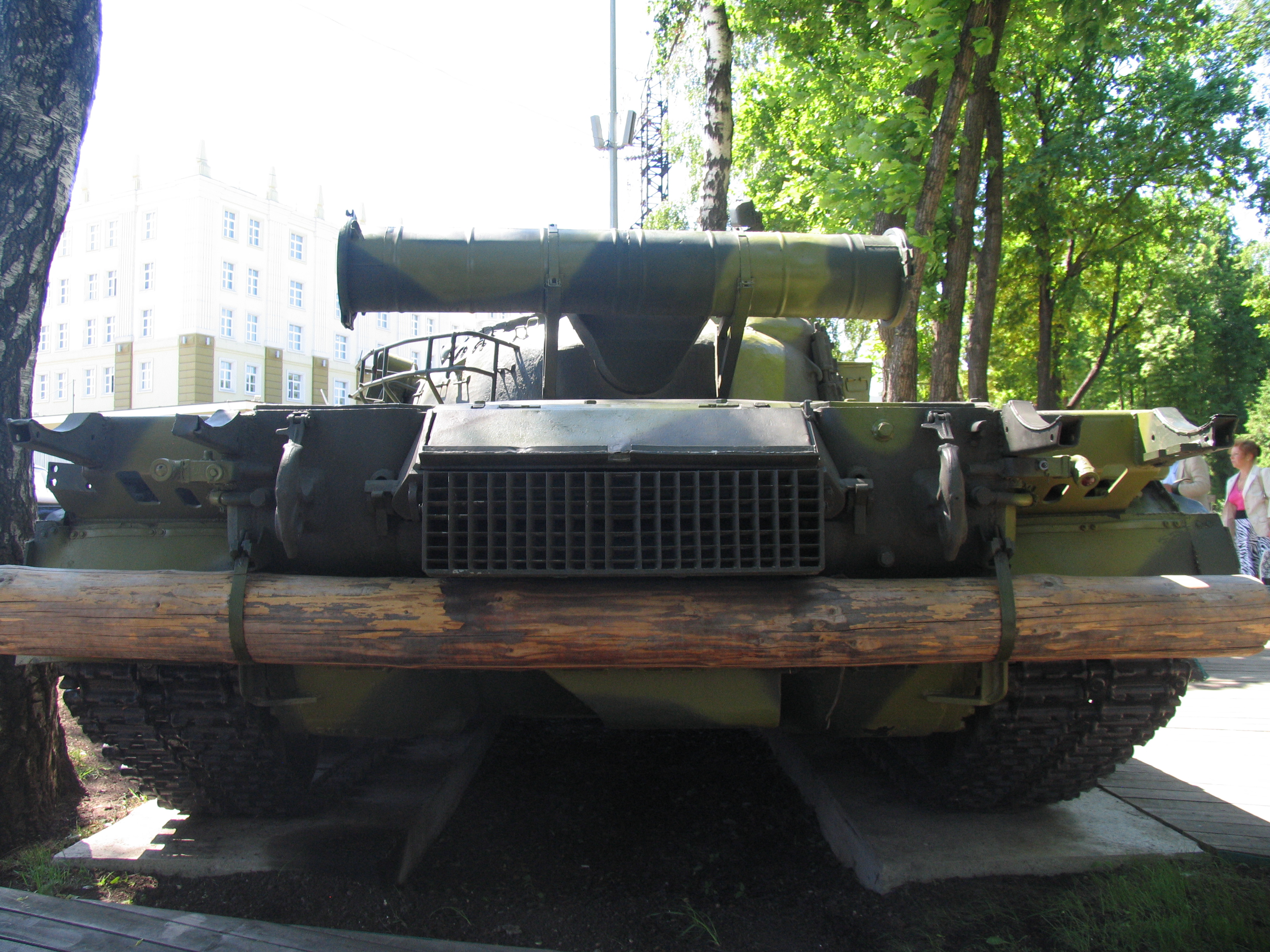 Т-80 в музее техники Задорожного. Вид сзади.